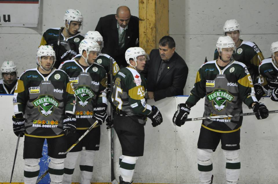 FTCtimeoutdw